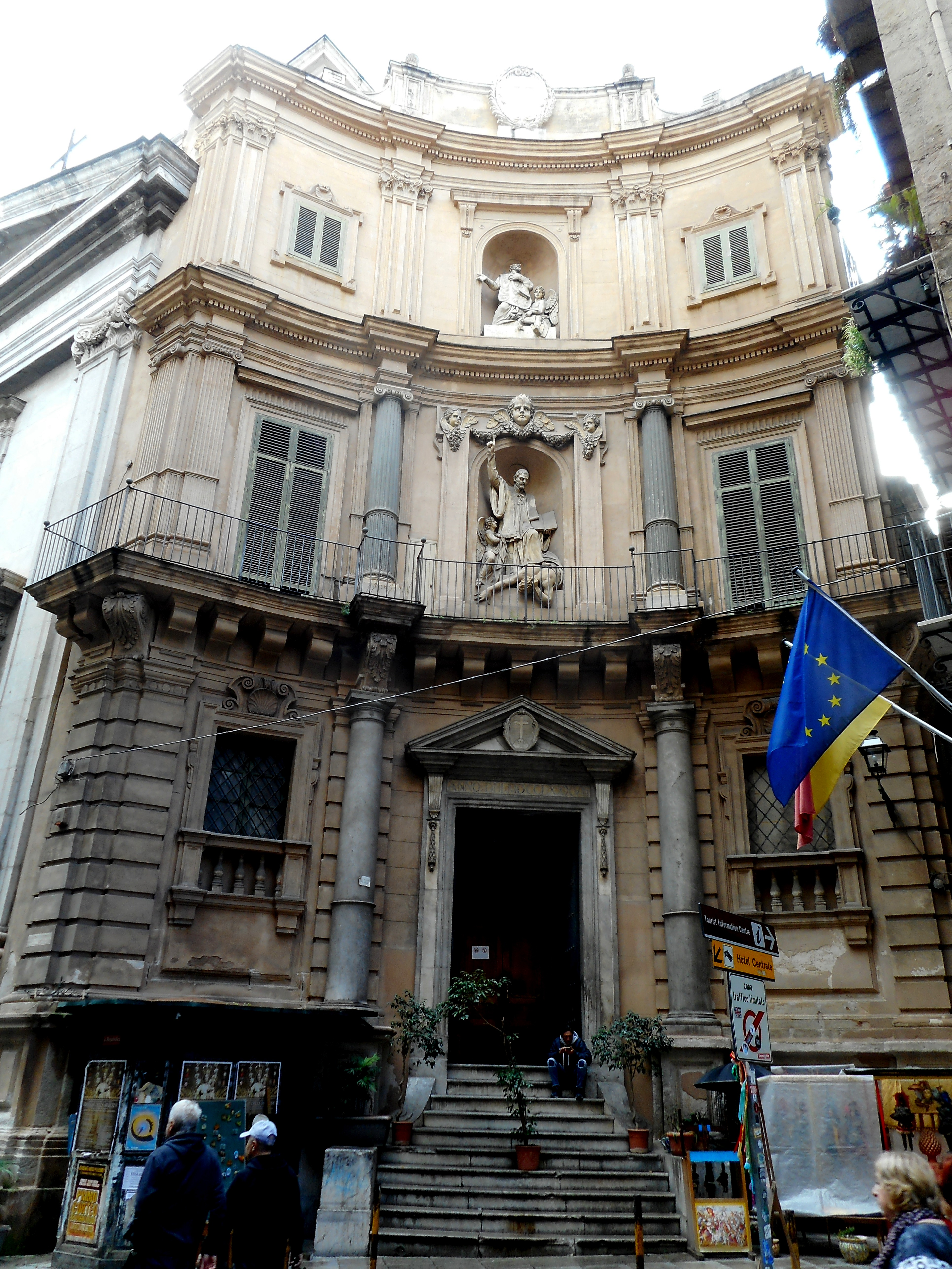 Facciata laterale della chiesa di san Giuseppe dei Teatini detta il "quinto canto" perché simile ai uno dei Quattro Canti